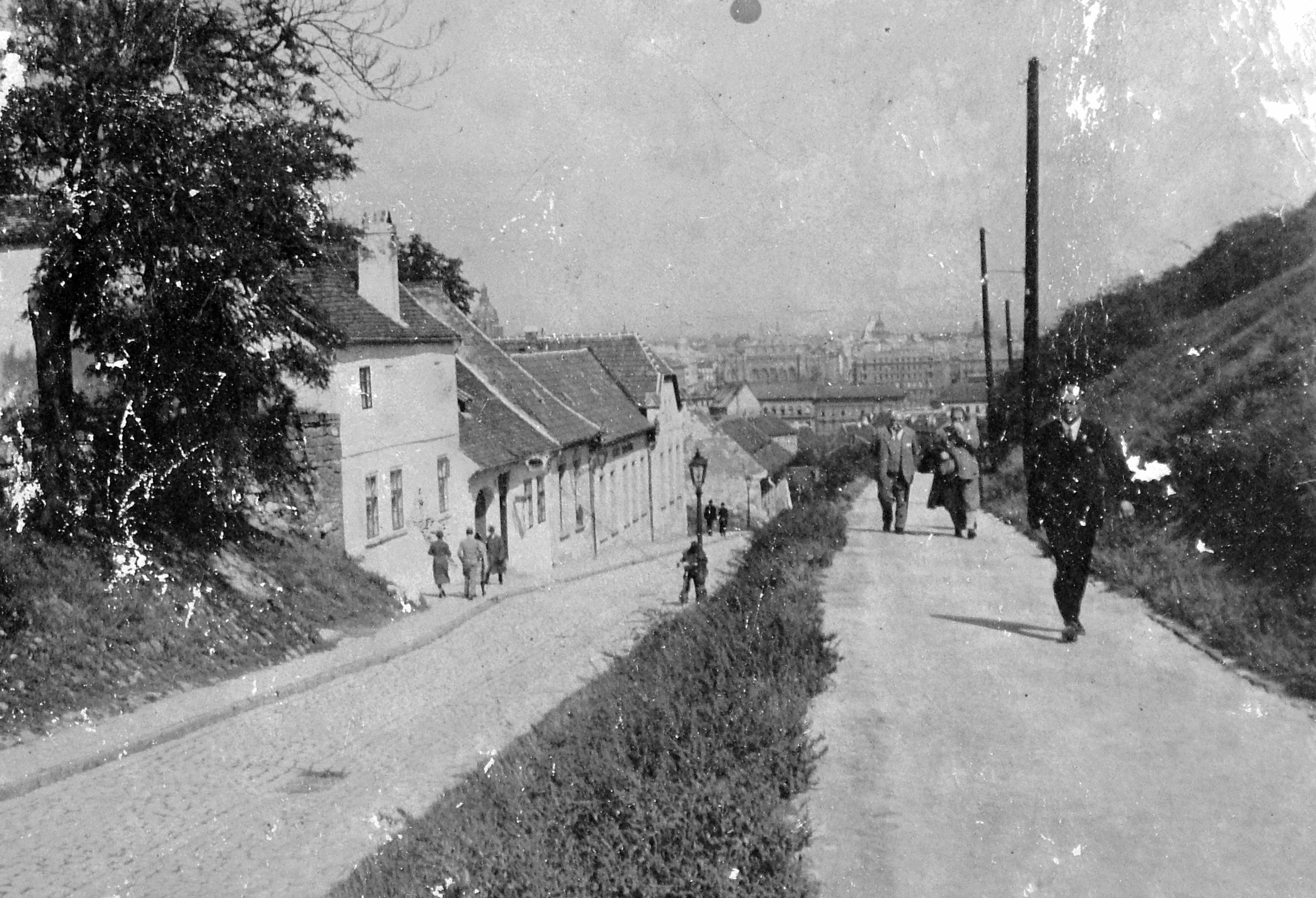 Hadnagy utca. Location: Hungary, Budapest I., Tabán Tags: Budapest, pedestrian Title: Hadnagy utca.